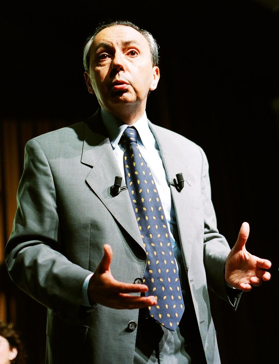 Bruno Mégret at Paris